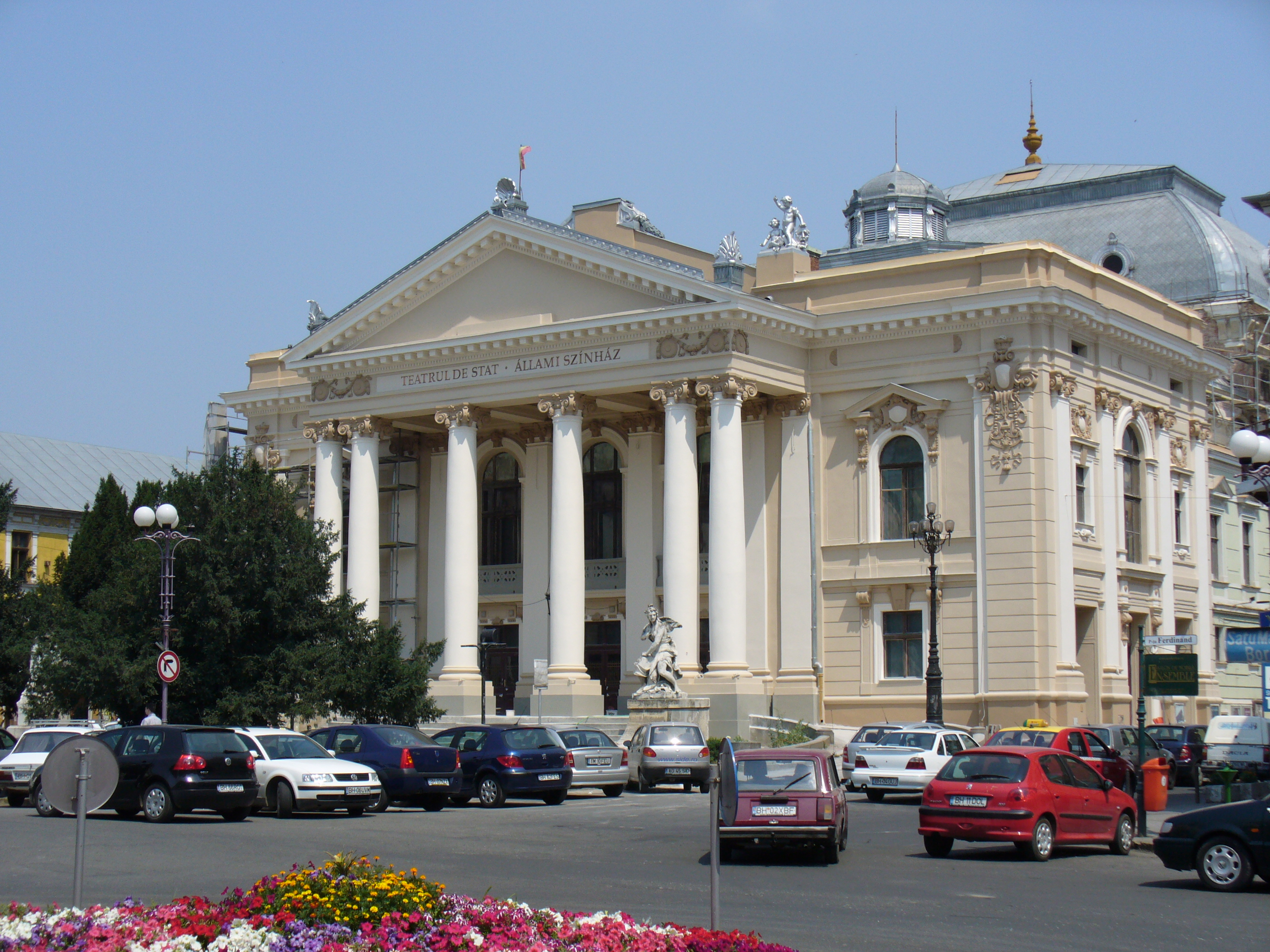 A Nagyváradi Állami Szinház. Épűlt 1899-1900 között. Saját készitésű kép.